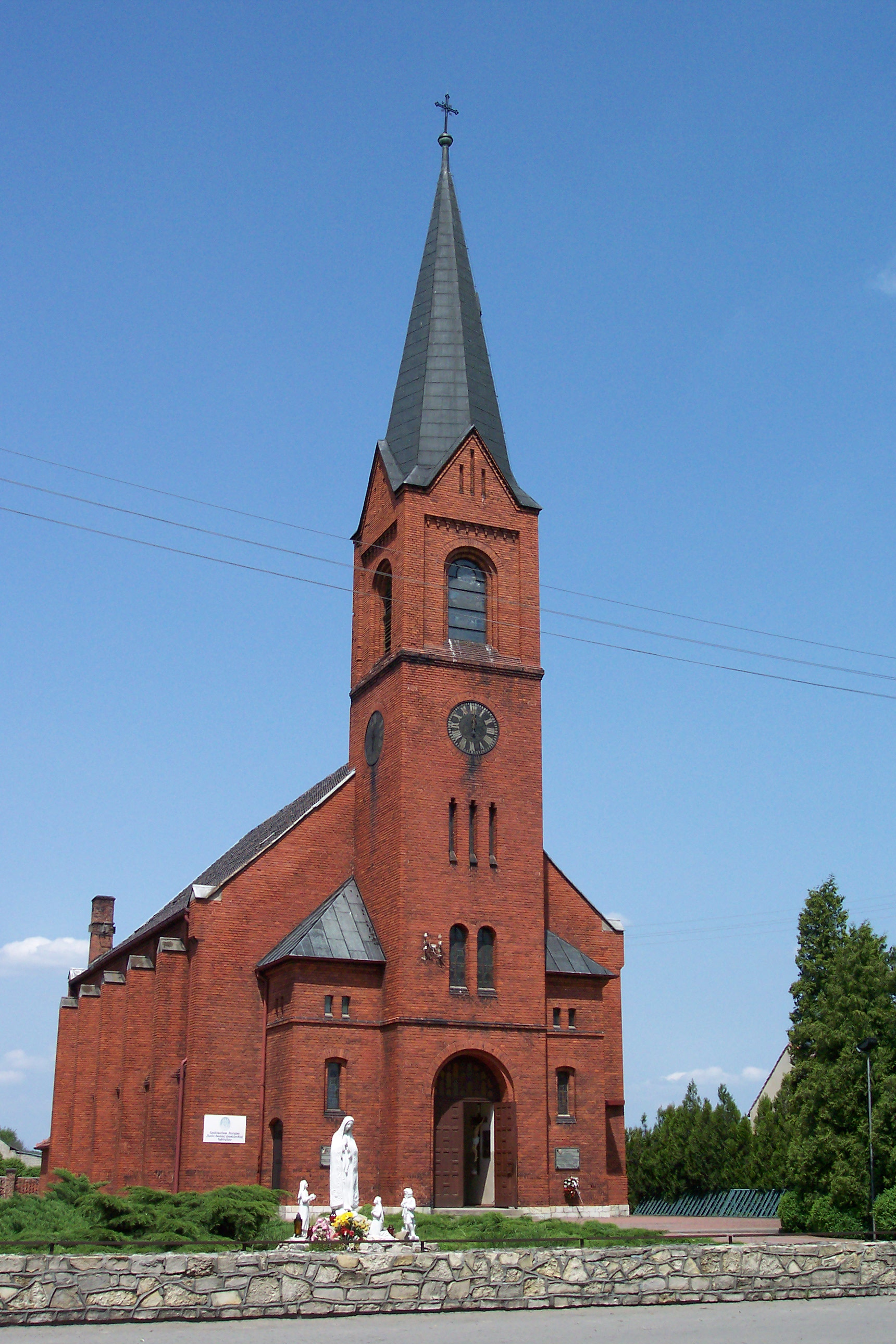 Grodziec, ul. Częstochowska 138 - rzymskokatolicki kościół parafialny p.w. MB Częstochowskiej i św. Wojciecha, 1891